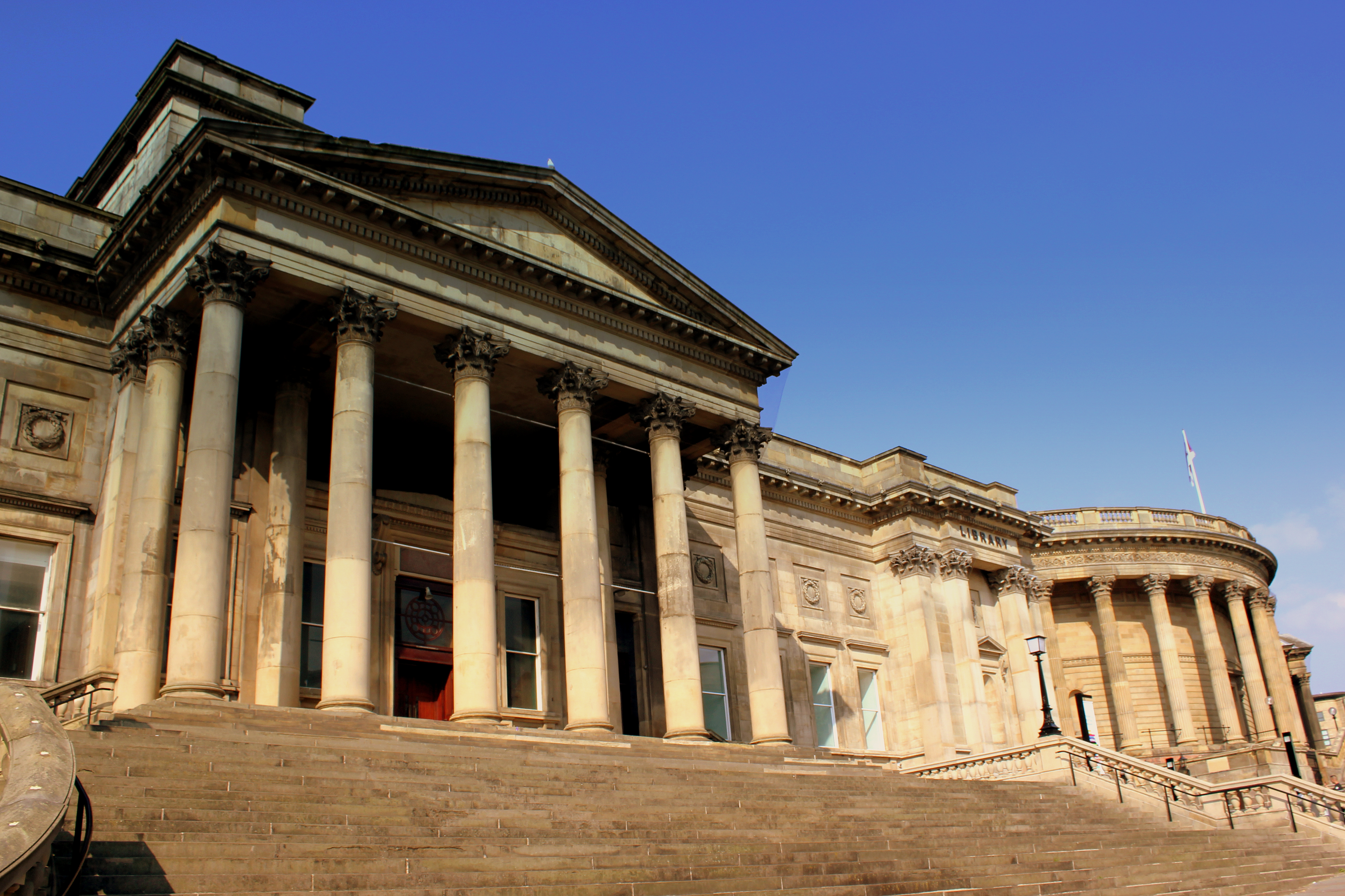 WORLD MUSEUM WILLIAM BROWN STREET LIVERPOOL AUG 2013